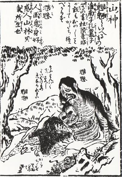 Chimi-Mōryō (魑魅魍魎) from Hyakkiyakō-Bakemonogatari (百鬼夜講化物語)